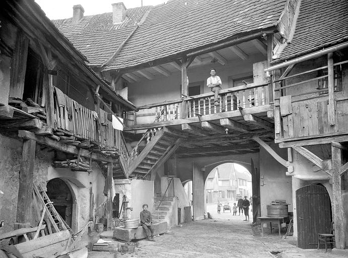 Maison à Scherwiller (Alsace) vers 1925, Georges-Louis Arlaud